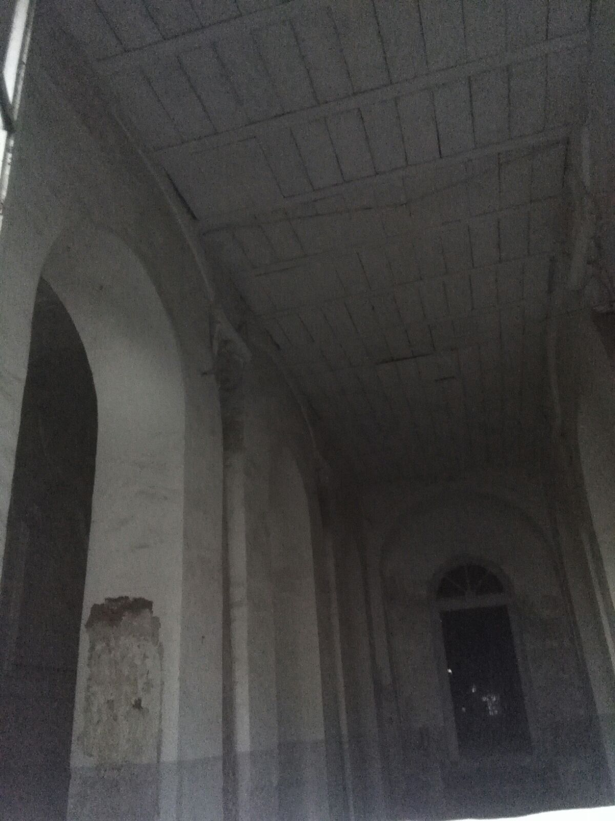 Chiesa del Palazzo San Massimo di Salerno, usata come palestra quando il palazzo era sede del Liceo Artistico Andrea Sabatini.